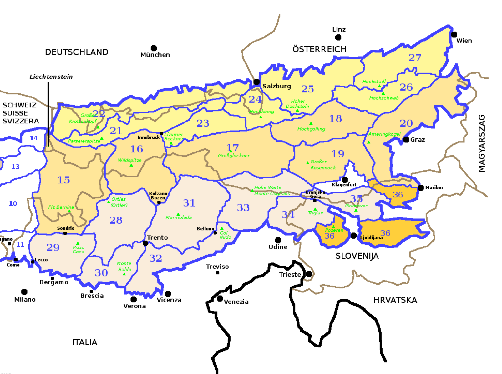 Alpi Orientali secondo la SOIUSA con evidenziate le Prealpi Slovene